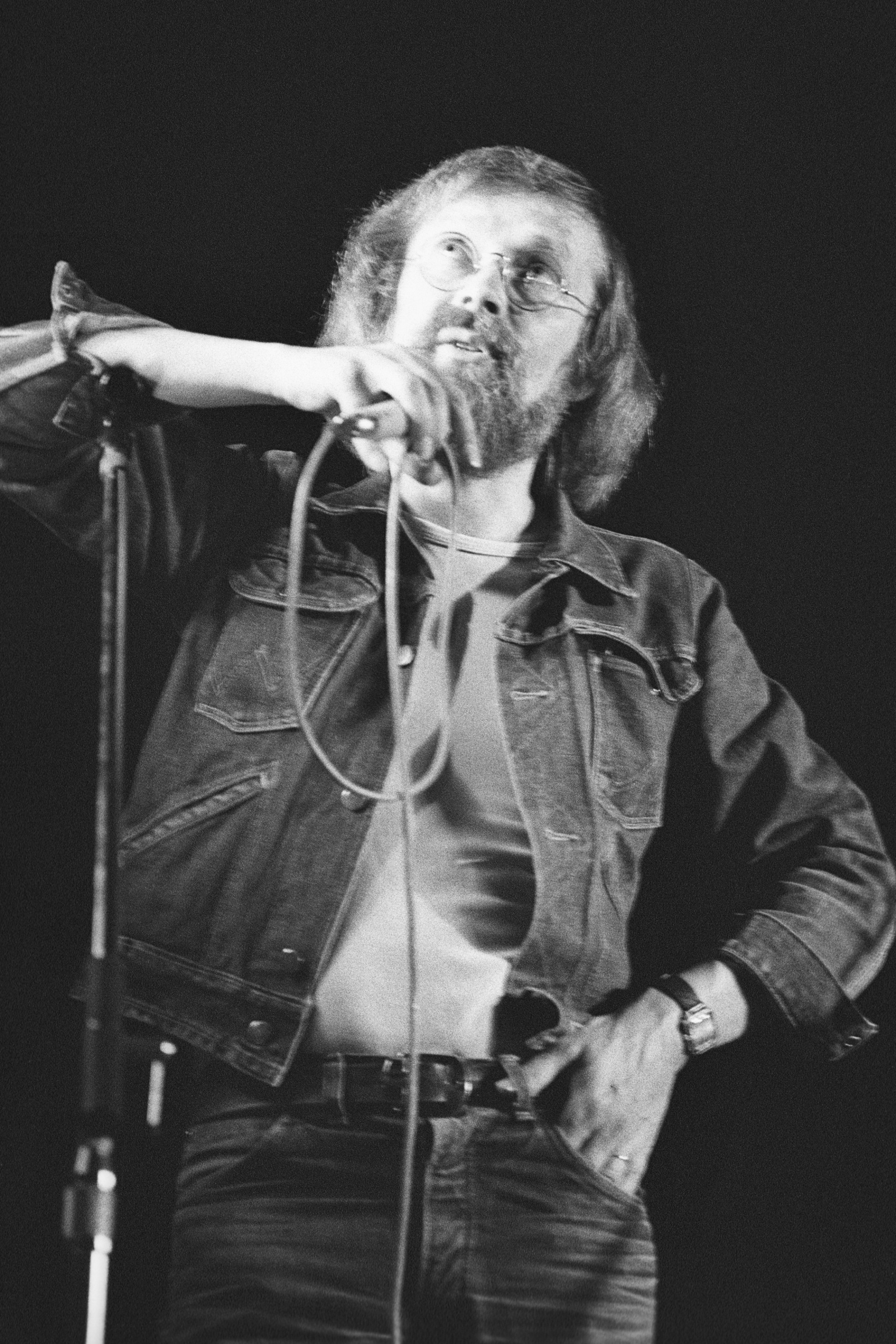 Ladislav Kantor, C&K Vocal, Divadlo Gong, Praha 9